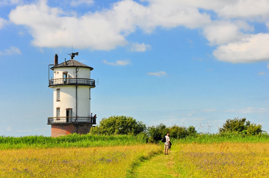 Rund um den alten Baljer Leuchtturm Sommer 2013